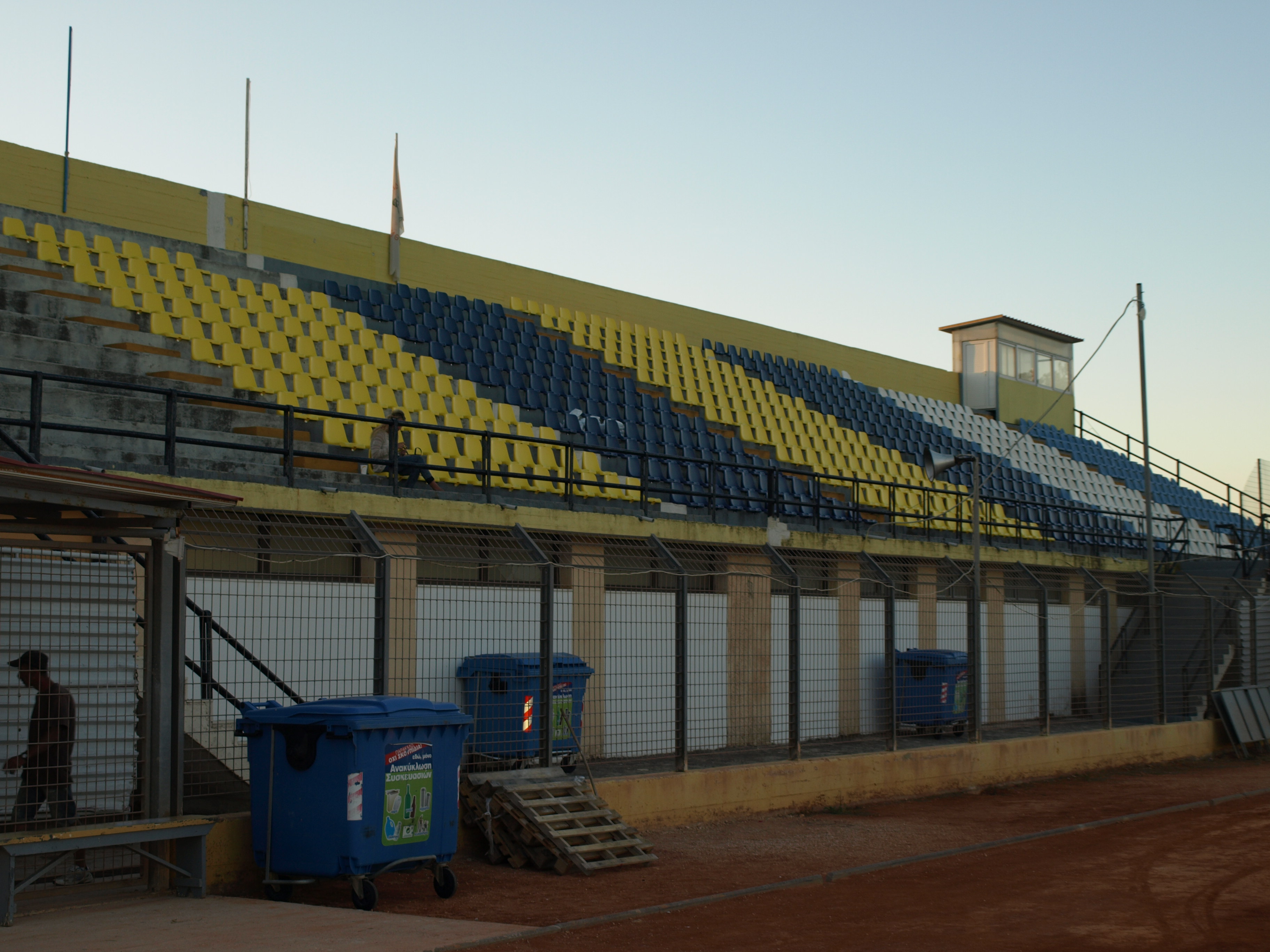 Η κεντρική εξέδρα του Δημοτικού Σταδίου Ζακύνθου